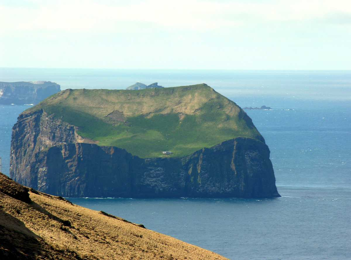 Iceland, Vestmannaeyjar